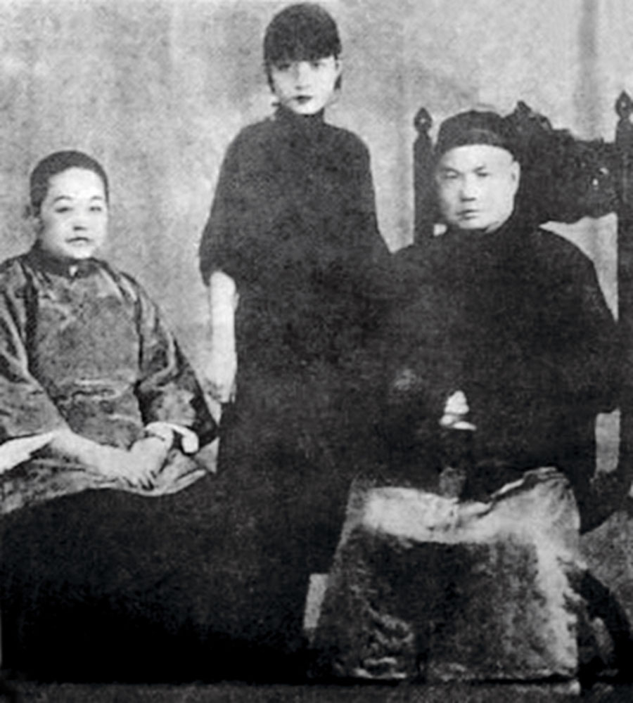 孟小冬与父母合影